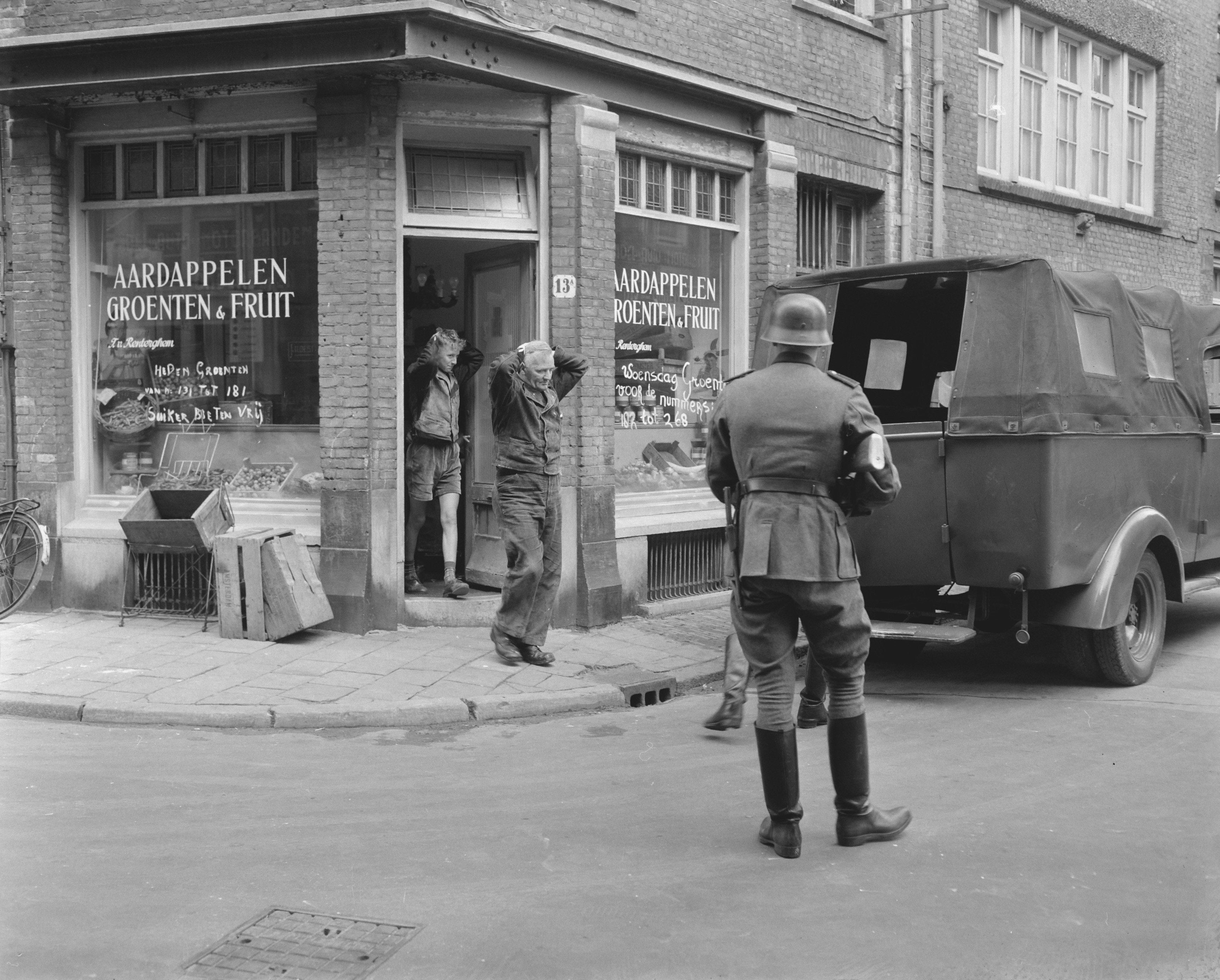 Collectie / Archief : Fotocollectie Anefo Reportage / Serie : [ onbekend ] Beschrijving : Opnamen voor de Anne Frankfilm in de Staalstraat te Amsterdam Datum : 28 juli 1958 Locatie : Amsterdam, Noord-Holland Trefwoorden : OPNAMEN Fotograaf : Bilsen, Joop van / Anefo Auteursrechthebbende : Nationaal Archief Materiaalsoort : Negatief (zwart/wit) Nummer archiefinventaris : bekijk toegang 2.24.01.04 Bestanddeelnummer : 909-7464 Reacties Geplaatst door Maaike op 15 januari 2013 - 17:00. Amerikaanse filmproductie naar het Dagboek van Anne Frank. De 20th Century Fox Filmmaatschappij met regisseur George Stevens, maakt film naar het Dagboek van Anne Frank. Voor de buitenopnames wordt o.a. in de Staalstraat te Amsterdam opnamen gemaakt. Trefwoorden: film; Dagboek van Anne Frank